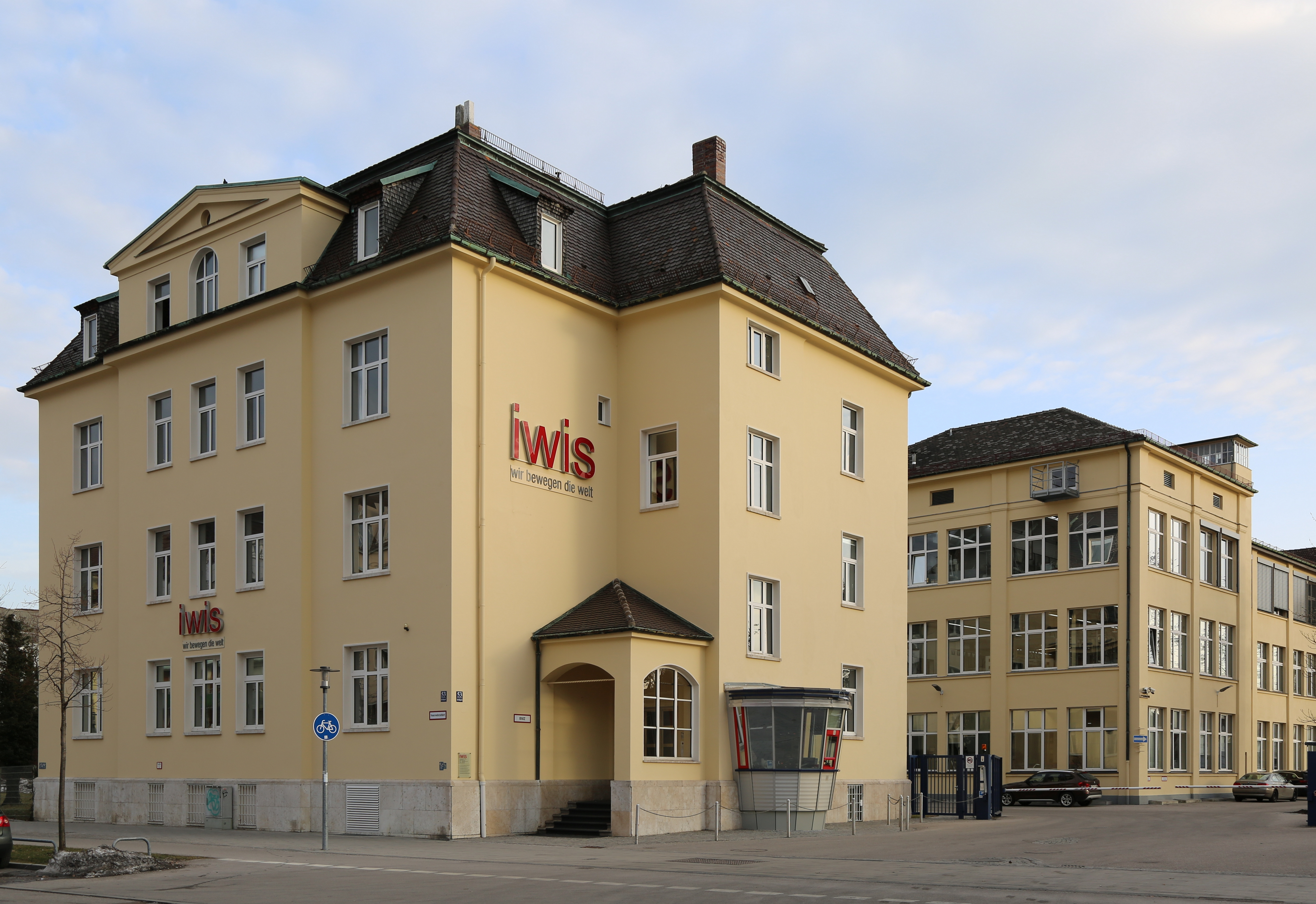 Firmensitz der Iwis Gmbh & Co KG, Albert-Roßhaupter-Straße 53, München Sendling-Westpark